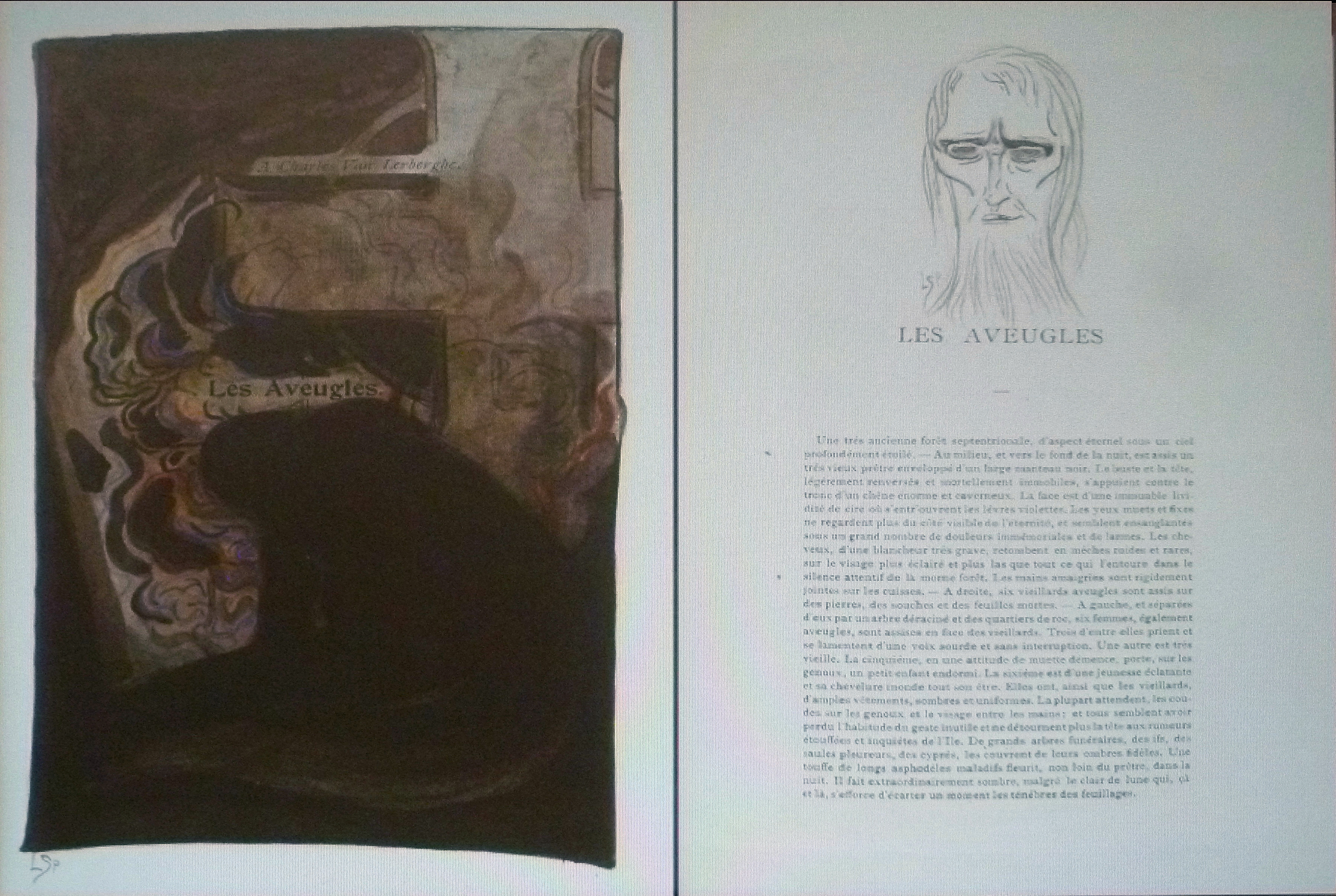 "Les Aveugles" (1890), theaterstuk door Maurice Maeterlinck; links: "Titelblad" ; rechts : "De priester-profeet"; illustraties door Léon Spilliaert (1903); potlood, Oost-Indische inkt, pen, kleurpotlood, aquarel op papier; privébezit